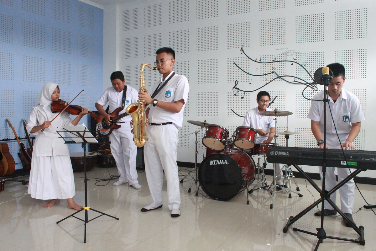 Ruang Musik SMA Islam Al Azhar 14 Semarang yang sering digunakan oleh anak-anak untuk mengasah keterampilan bermusik.